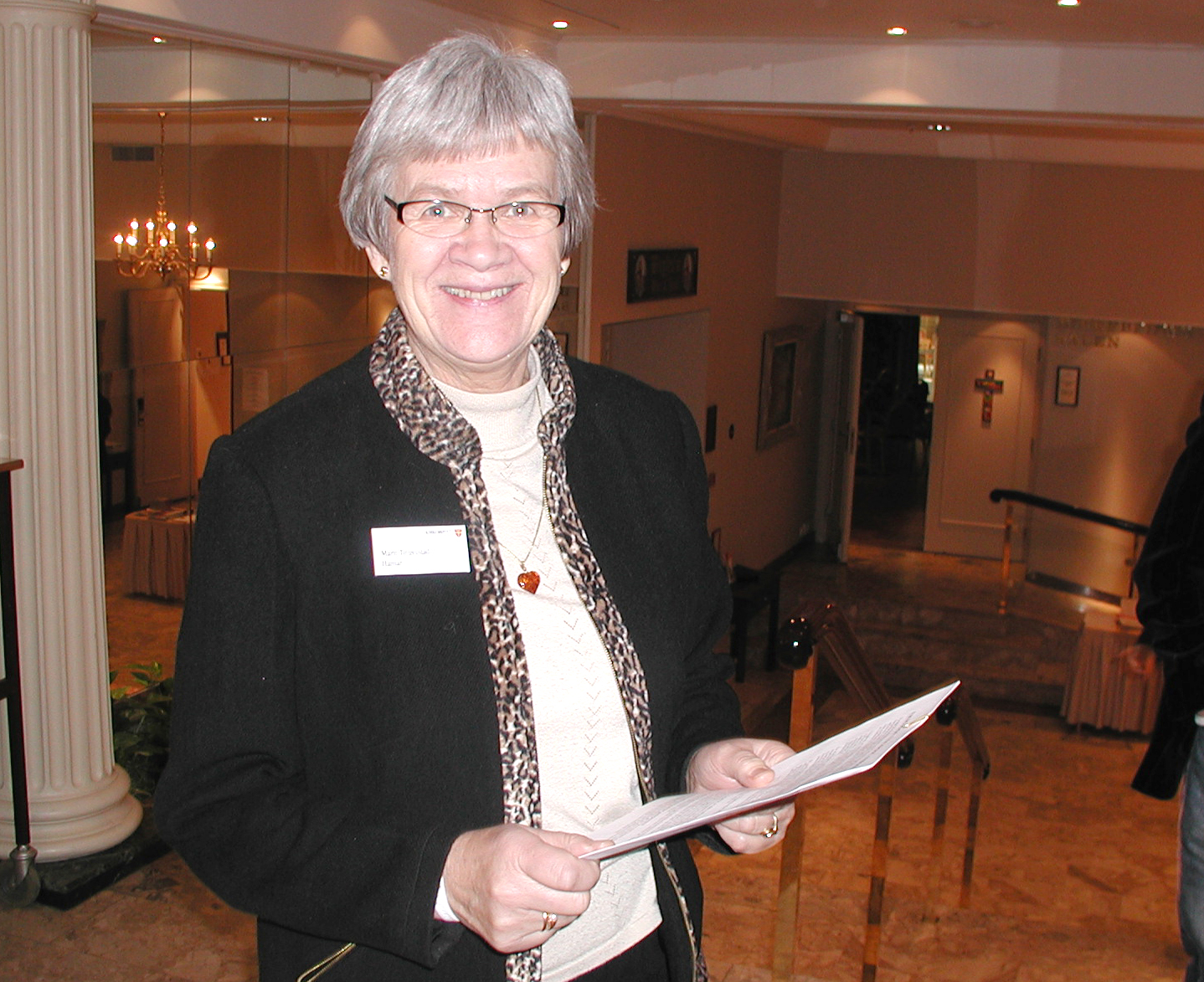 Marit Tingelstad, norsk politiker (Sp).